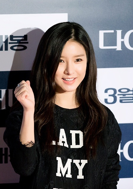 140219-다이애나-VIP시사회김소은